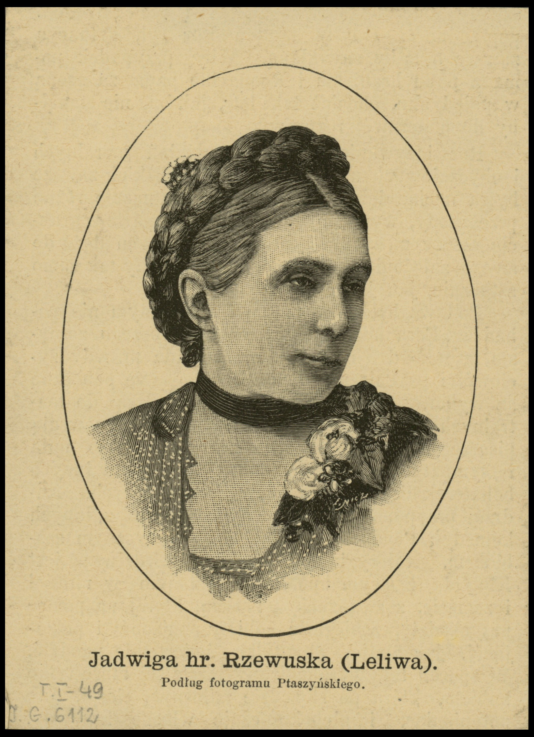 Jadwiga Rzewuska, 1889 r.